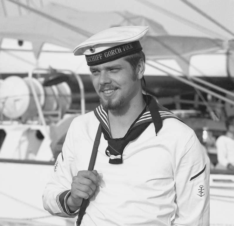 Das Segelschulschiff der Bundesmarine "Gorch Fock" verlässt zur 48/49 Auslandsausbildung den Kieler Hafen